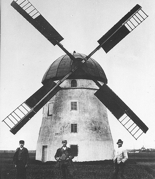 Original image description from the Deutsche Fotothek Markersdorf-Gersdorf. Holländer- oder Waltermühle (um 1846 erbaut, 1923 stillgelegt, 25.1.1965 gesprengt)